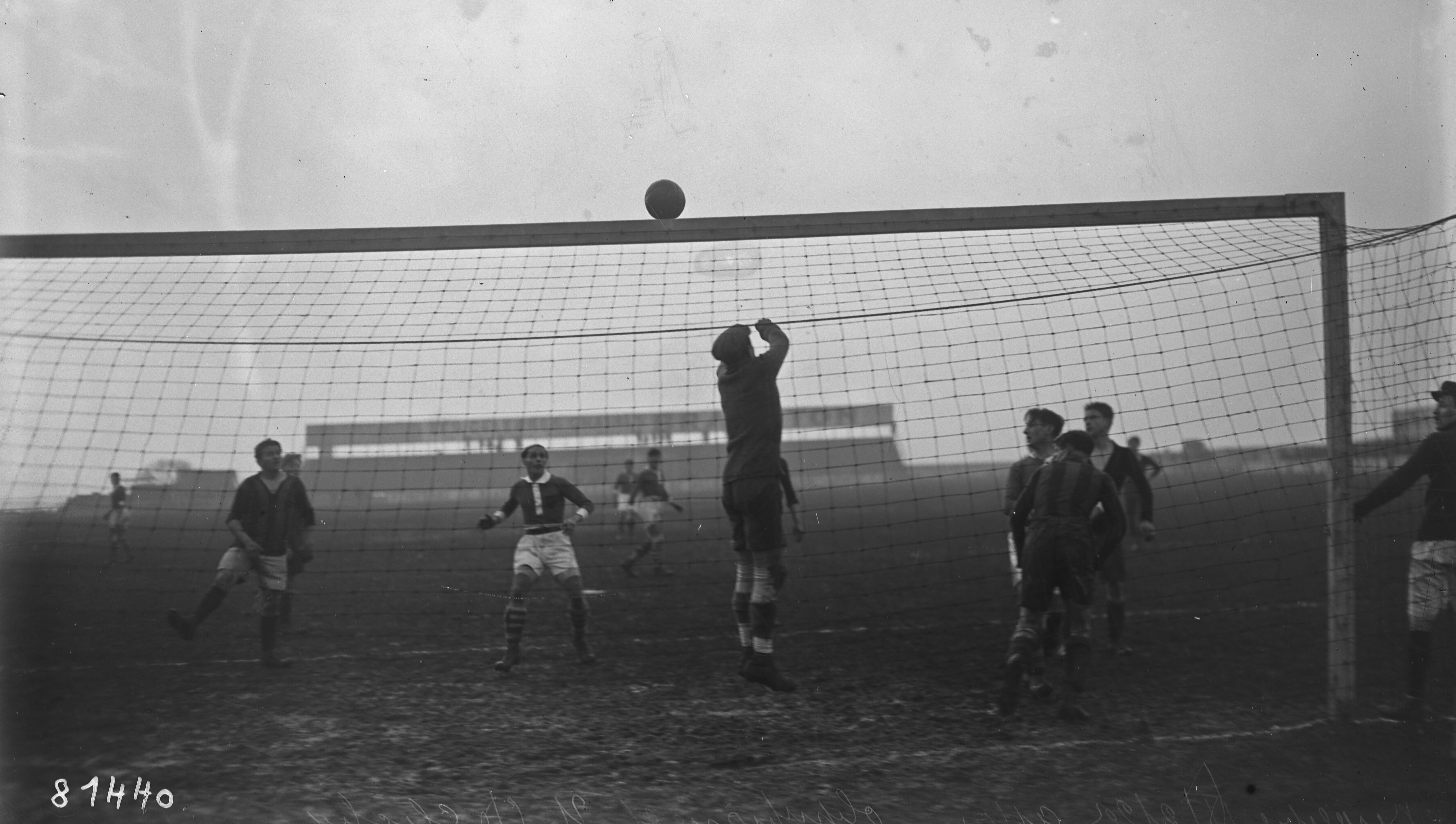 Match de football au stade Bergeyre le 18 février 1923 entre l'Union sportive et amicale de Clichy et l'Olympique de Paris pour le compte de la Coupe de Paris. Victoire 5-1 de l'Olympique (sources : et